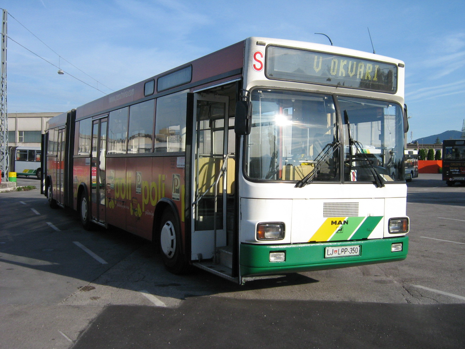 Avtobus MAN SG 240 (nadgradnja opravljena v Avtomontaži) v lasti Ljubljanskega potniškega prometa. Avtor: Uporabnik:BurekBuster